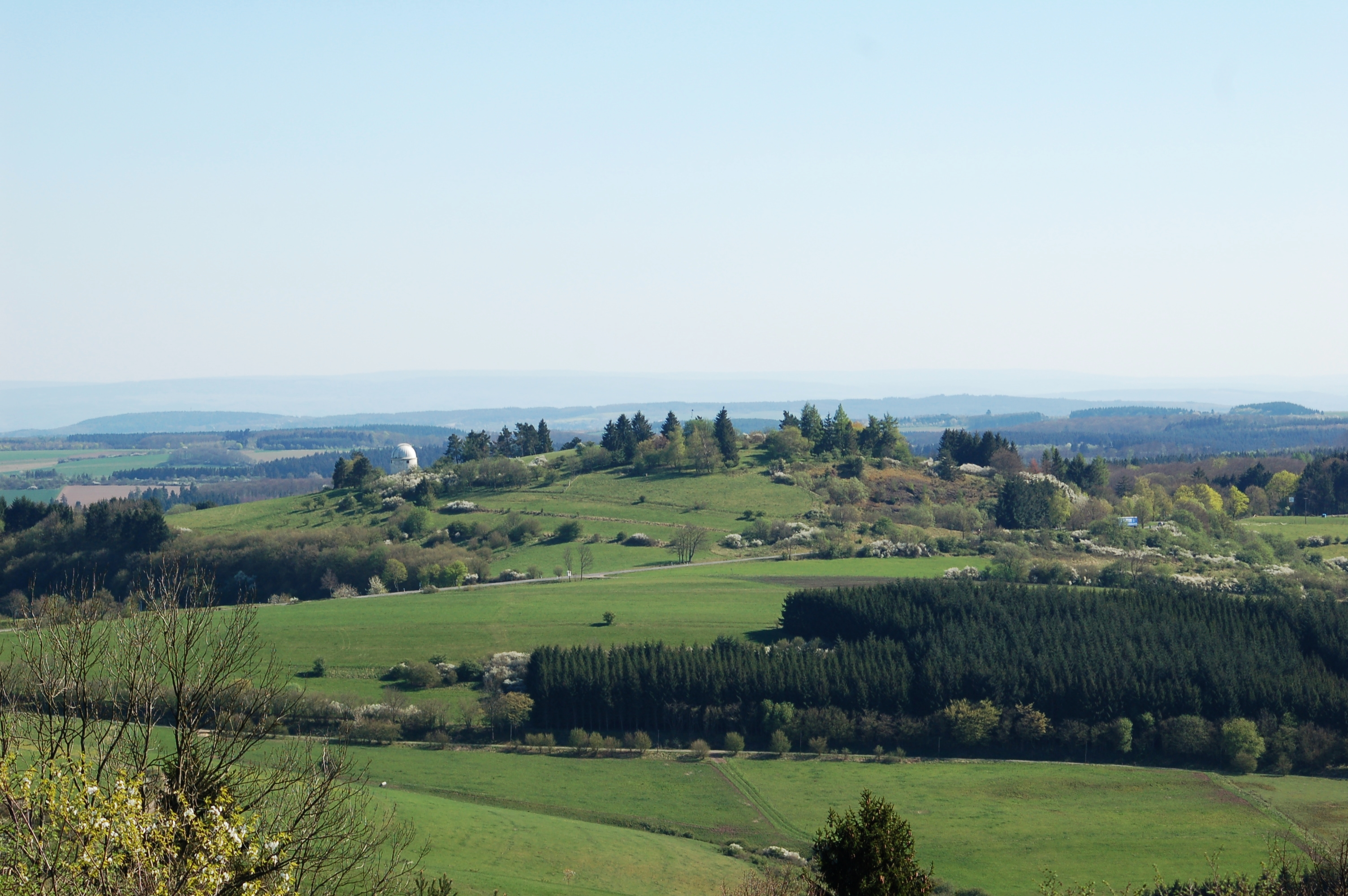 Hoher List vom Fuße des Mäusebergs aus fotografiert